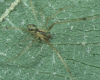 male Chrysso sasakii from Okinawa.